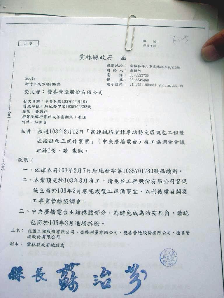 2014年2月19日，雲林縣政府「府地發字第1035702392號函」：請台灣高鐵雲林車站特定區統包工程各統包商於本年3月拆除中央廣播電臺虎尾分臺「主結構體部分」，以免「成為治安死角」。